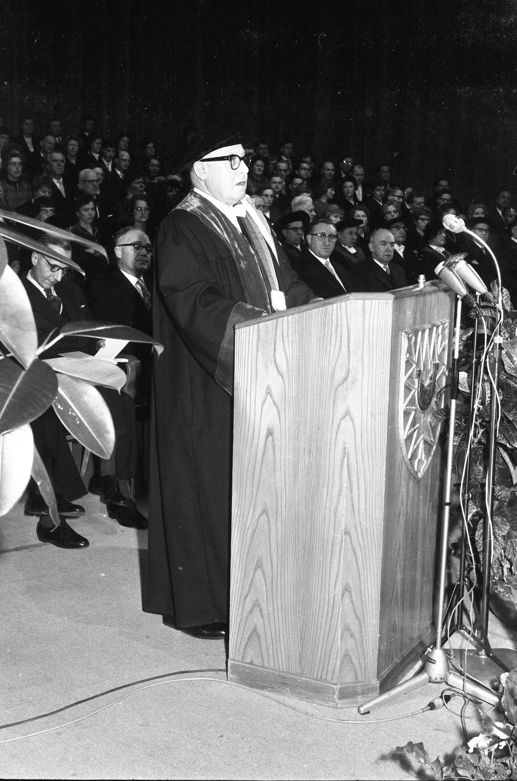 Festakt im Stadttheater. Im Bild IfW-Direktor Prof. Dr. Erich Schneider am Rednerpult.